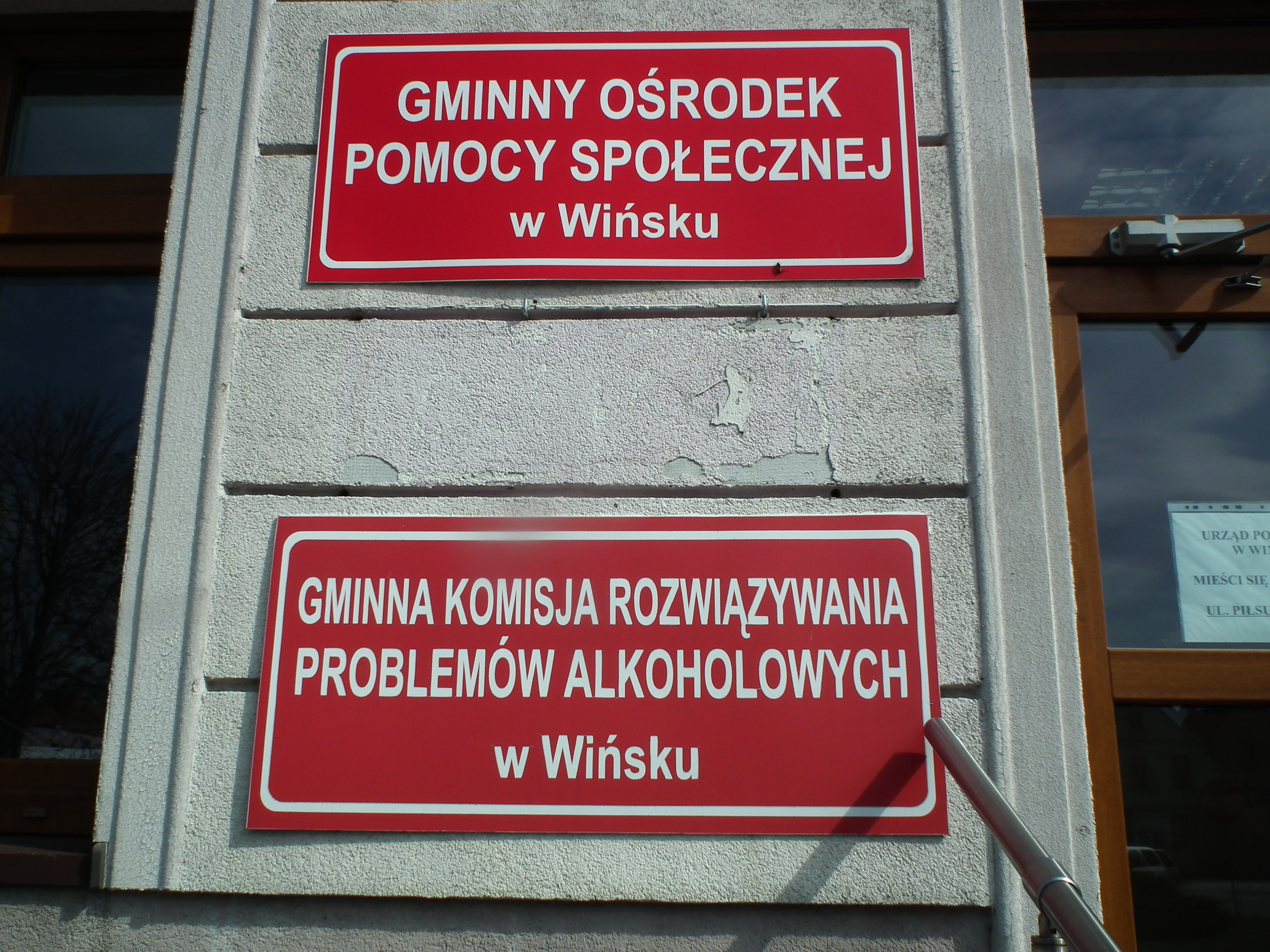 GOPS w Wińsku.